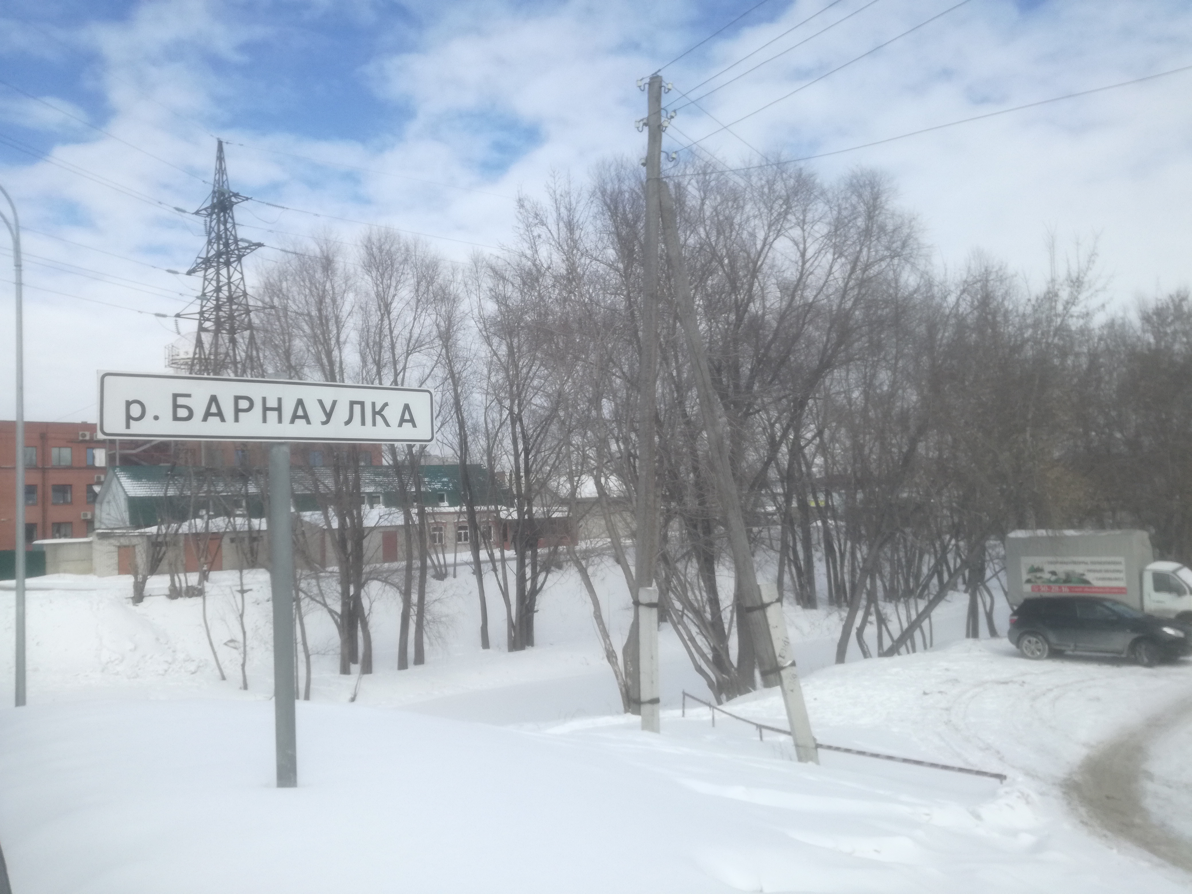 Река Барнаулка